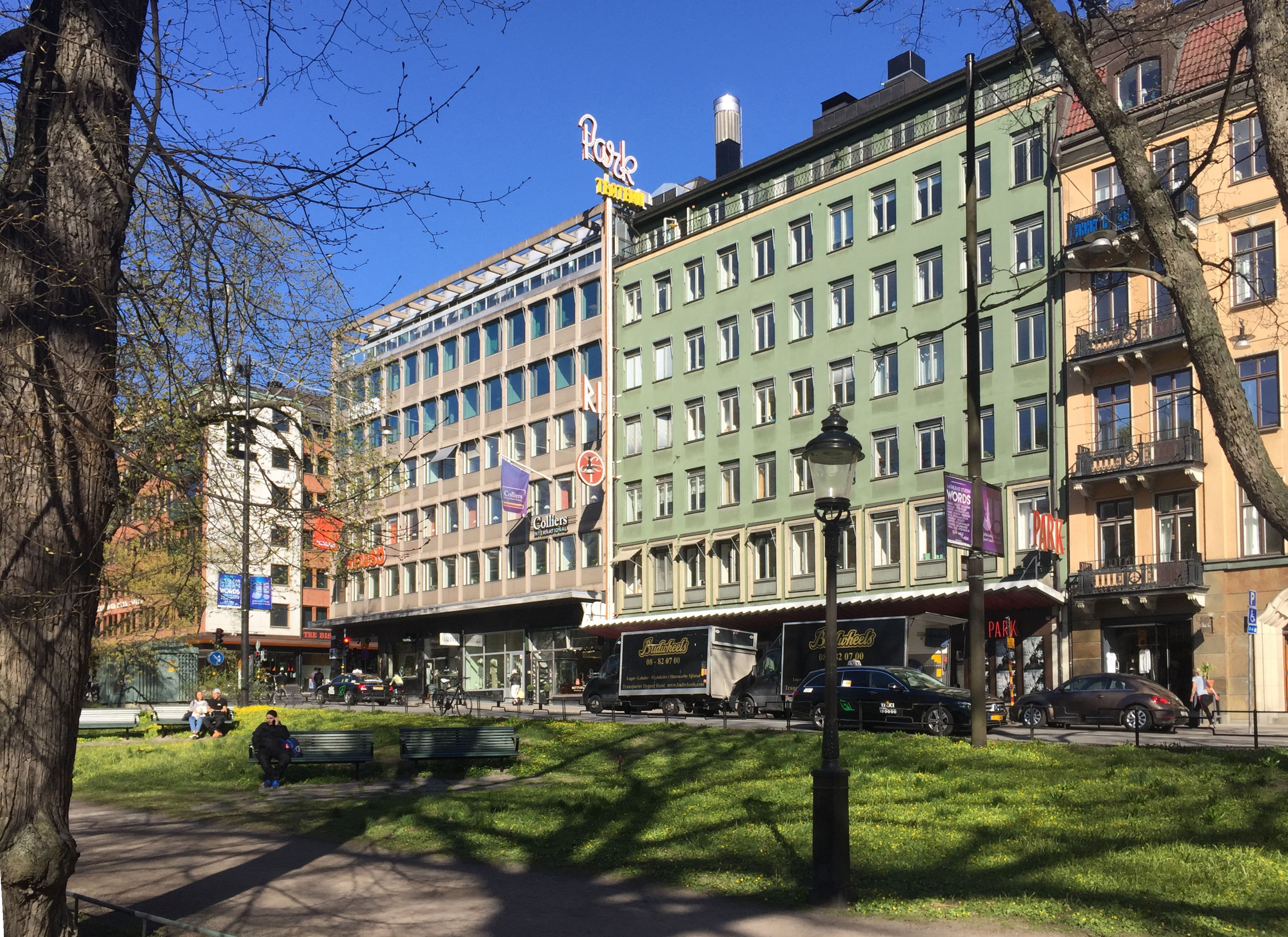 Sturegatan